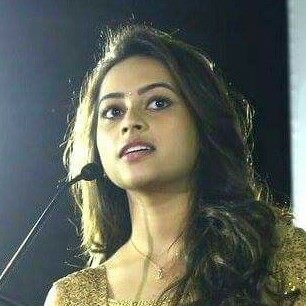 Sri Divya at Eetti movie audio launch